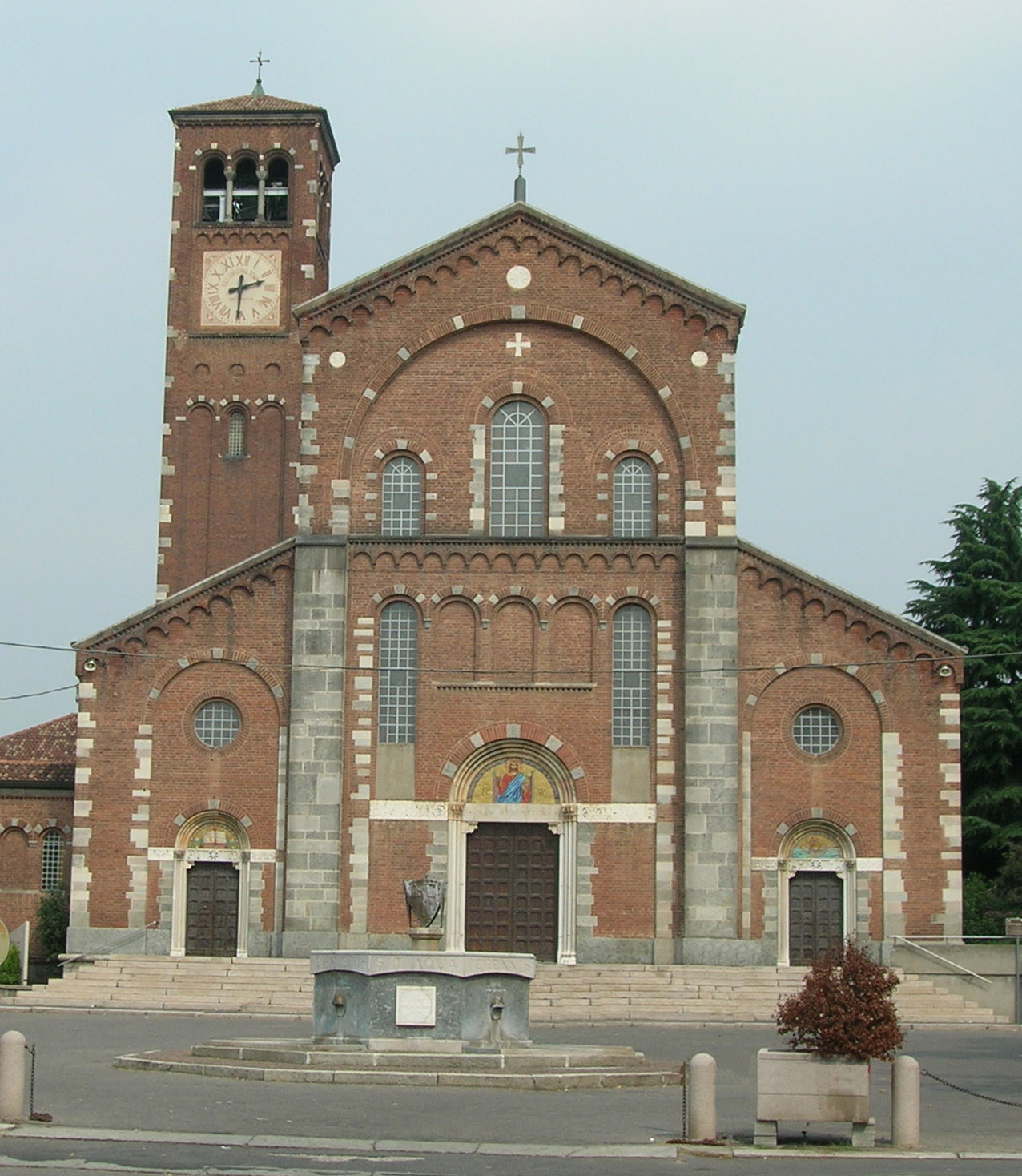 Chiesa del SS.Redentore Legnano